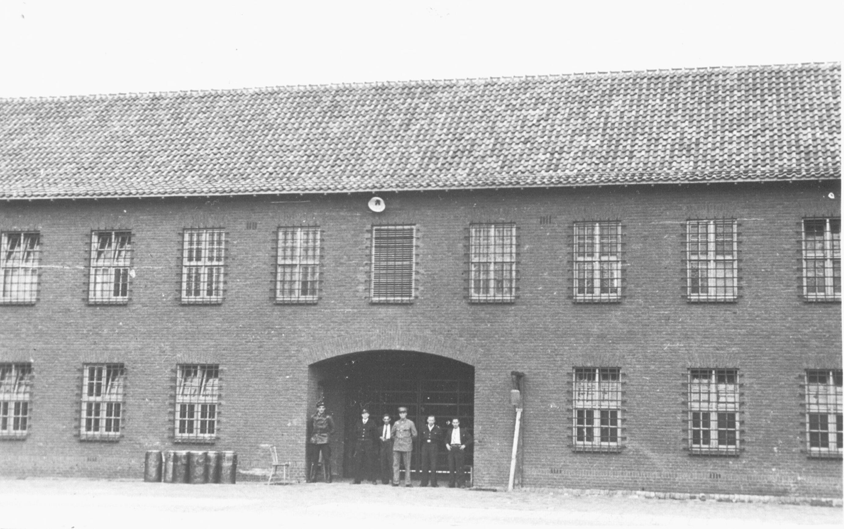 Kamp Vught. Bunker. najaar 1944. fotonr 65886 collectie NIOD